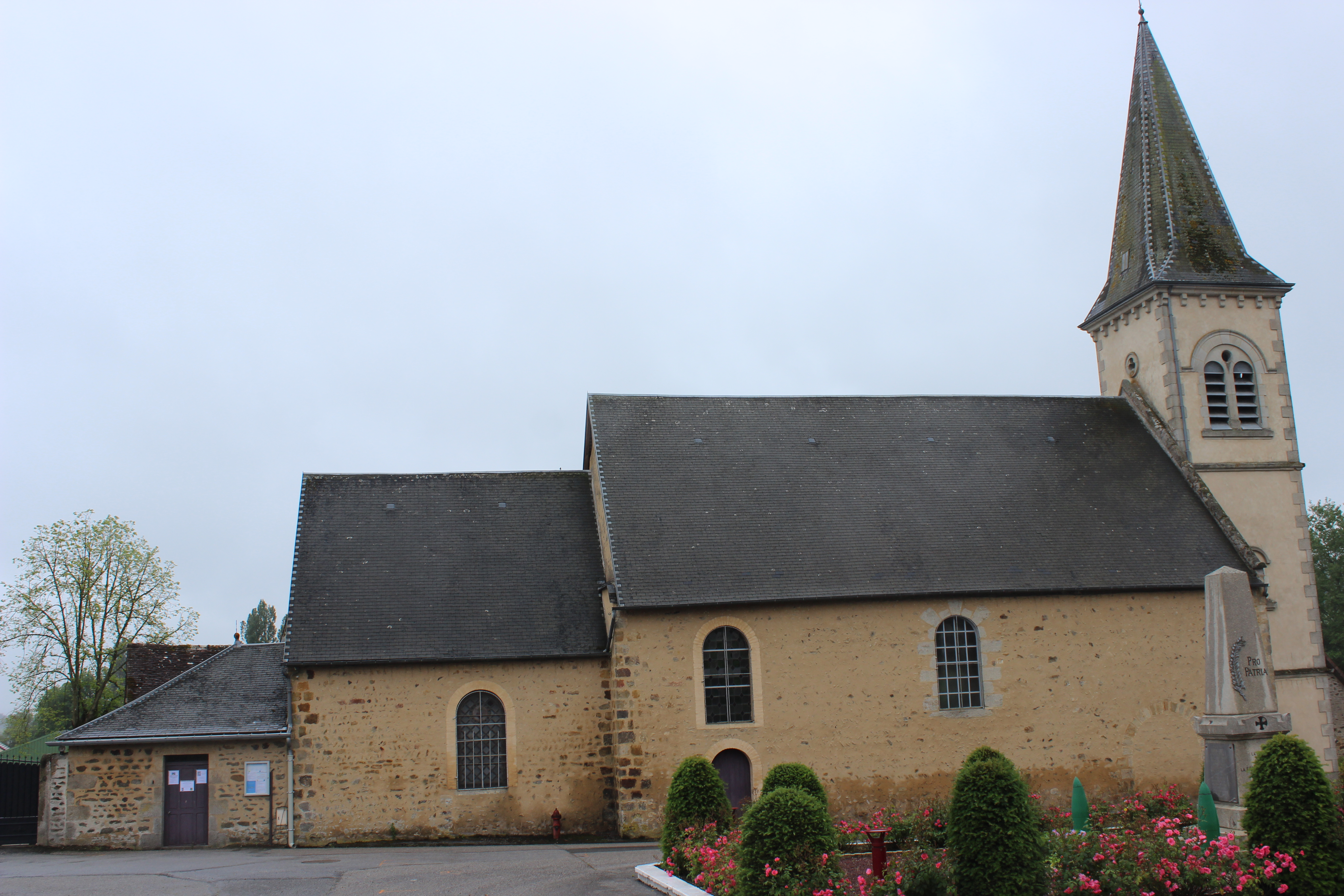 La Ferrière Bochard - église